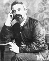 O antropólogo e fotógrafo ítalo-brasileiro Ermanno Stradelli.